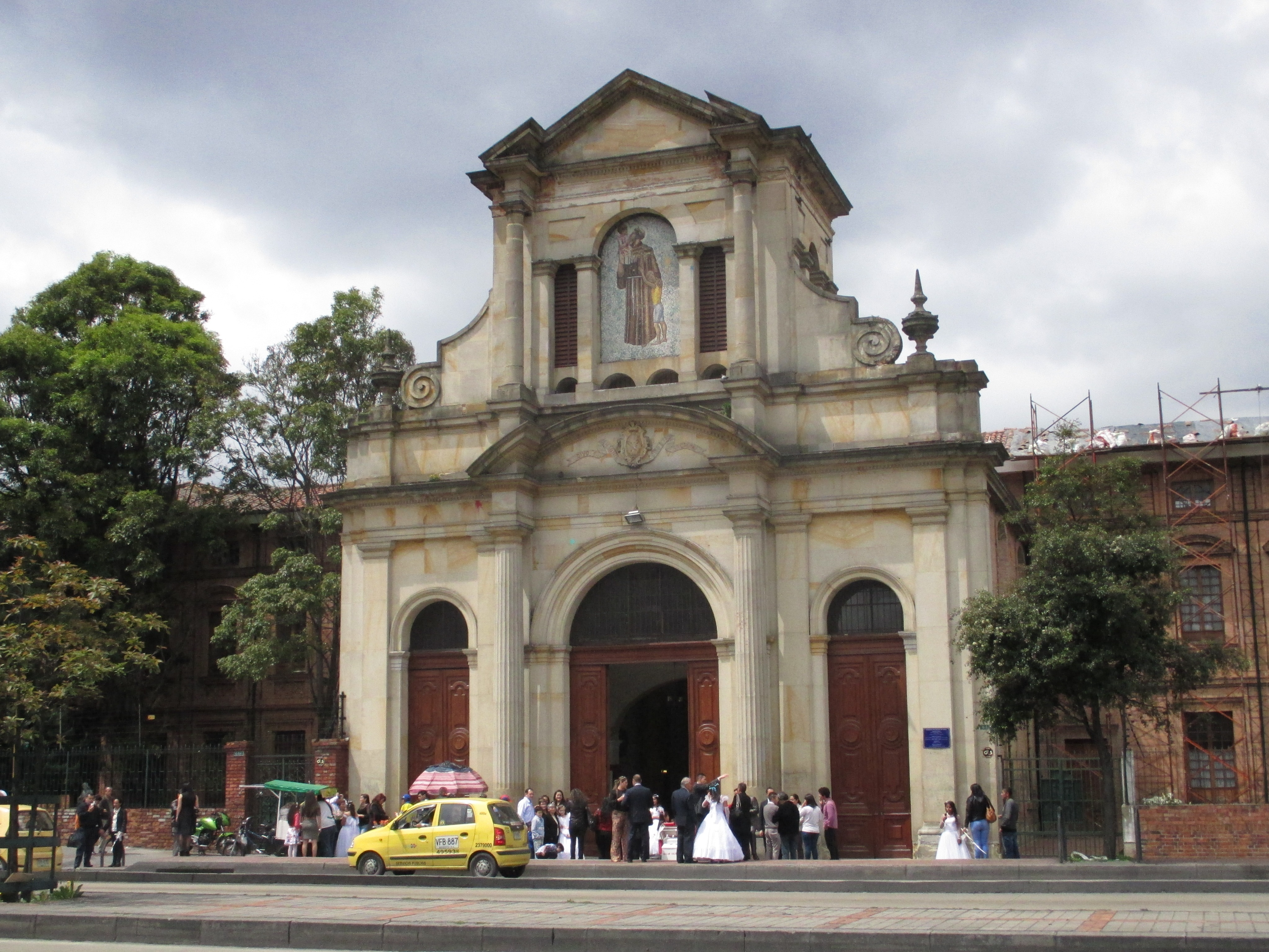 Bogotá